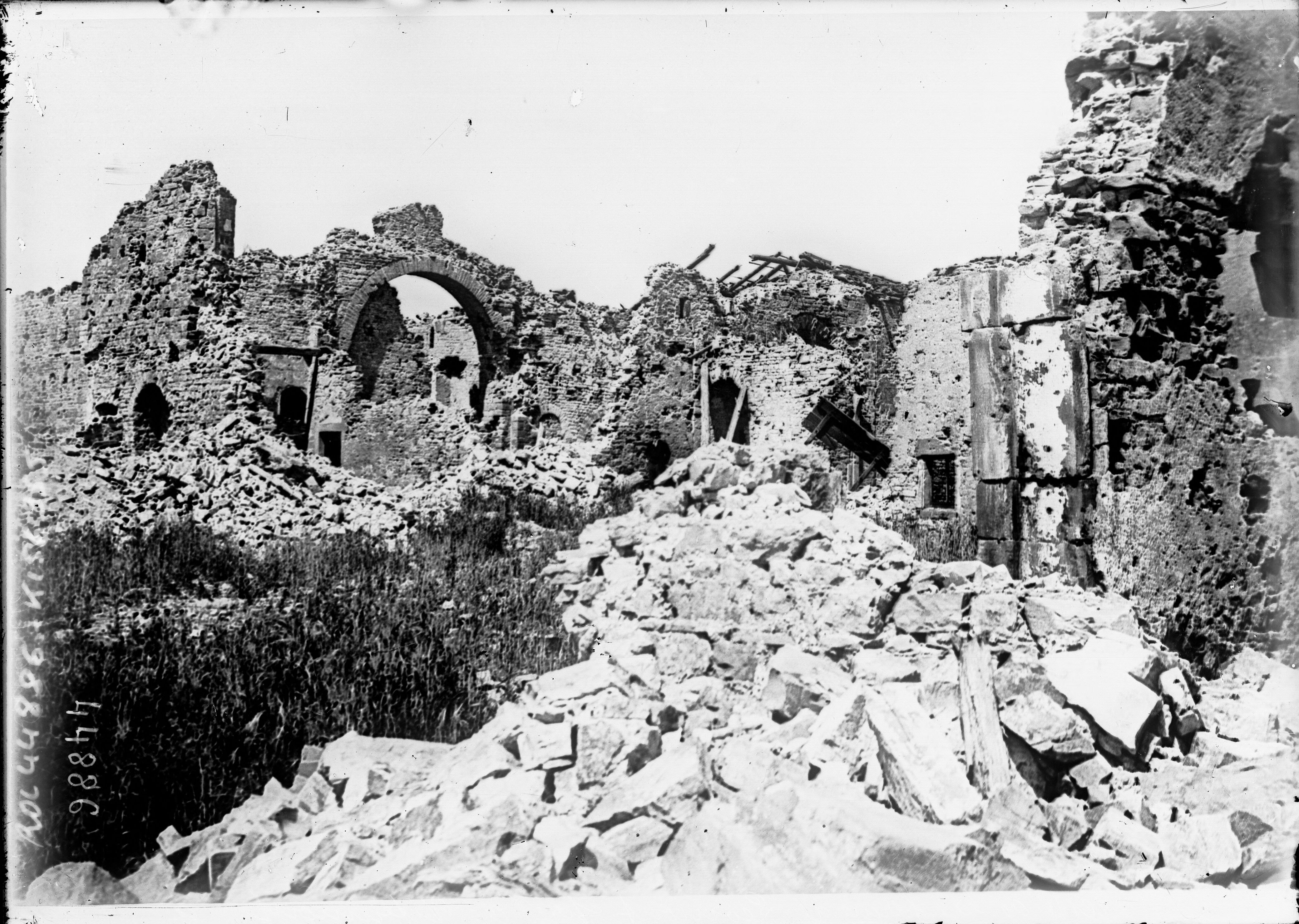 Guerre mondiale (1914-1918) -- Destruction et pillage -- France -- Lunéville